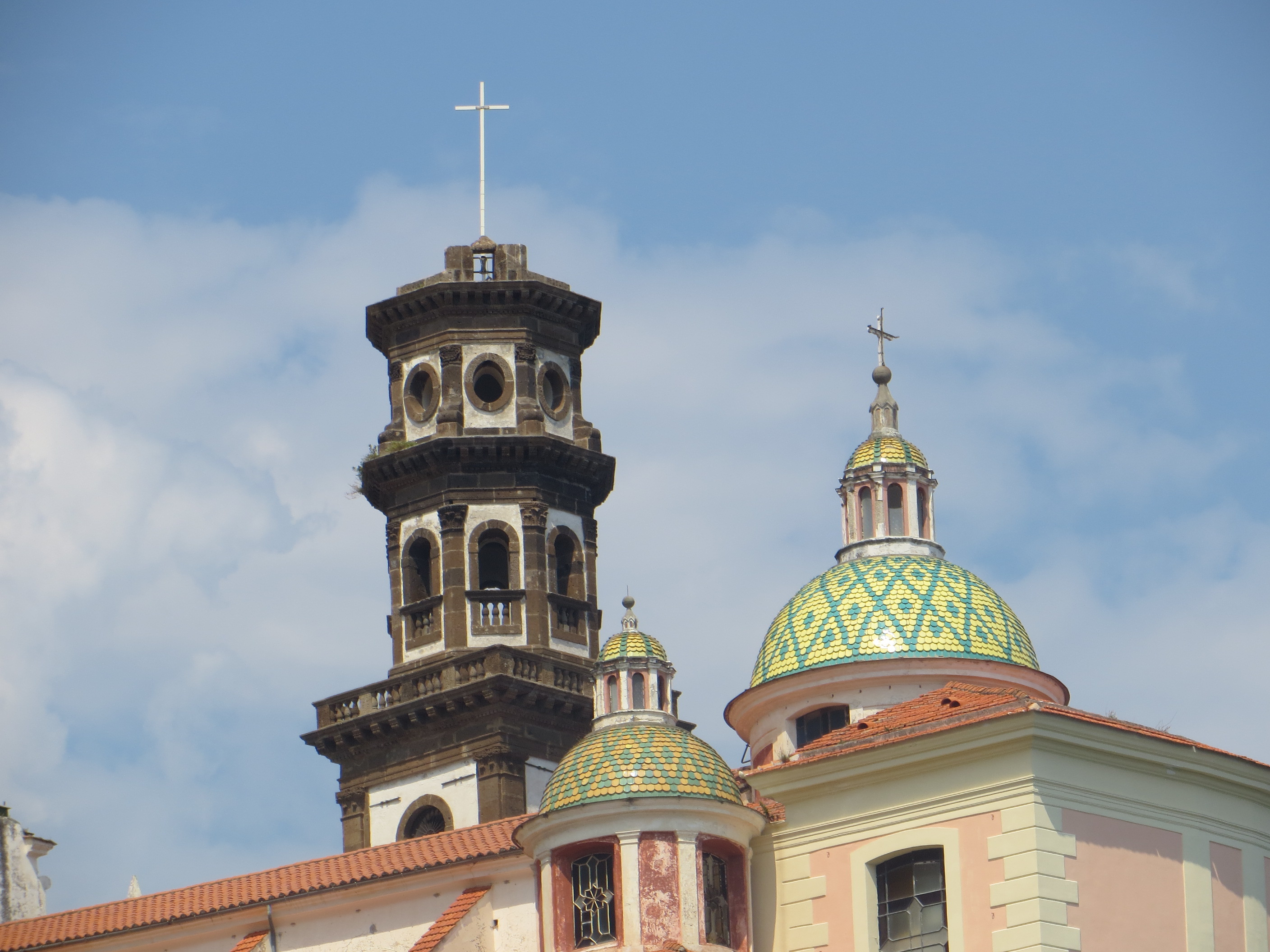 Cupola e campanile della Chiesa di Santa Maria Maddalena Penitente ad Atrani (SA)